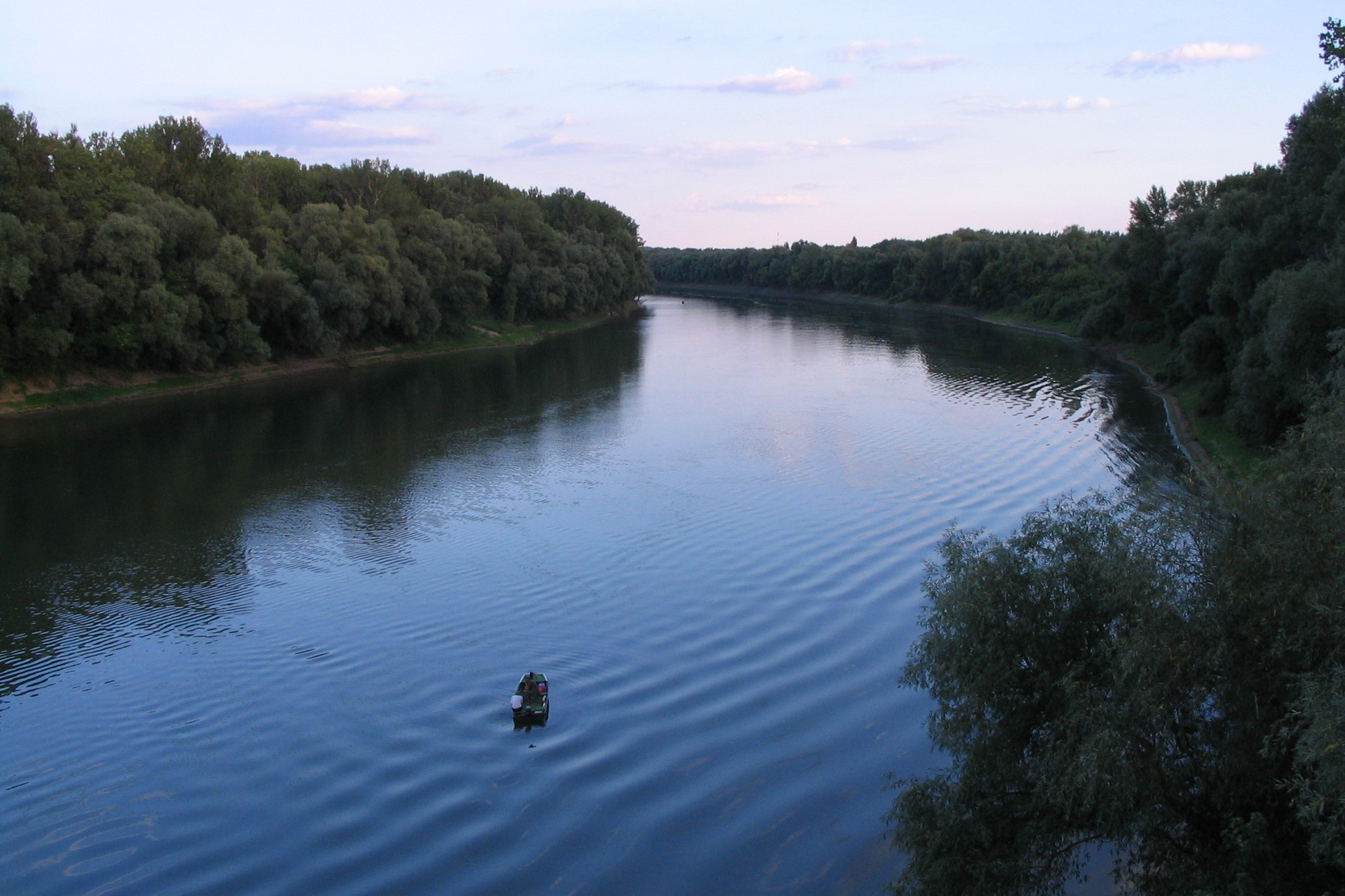 Halászok a Szentes-csongrádi közúti Tisza-hídról nézve?.